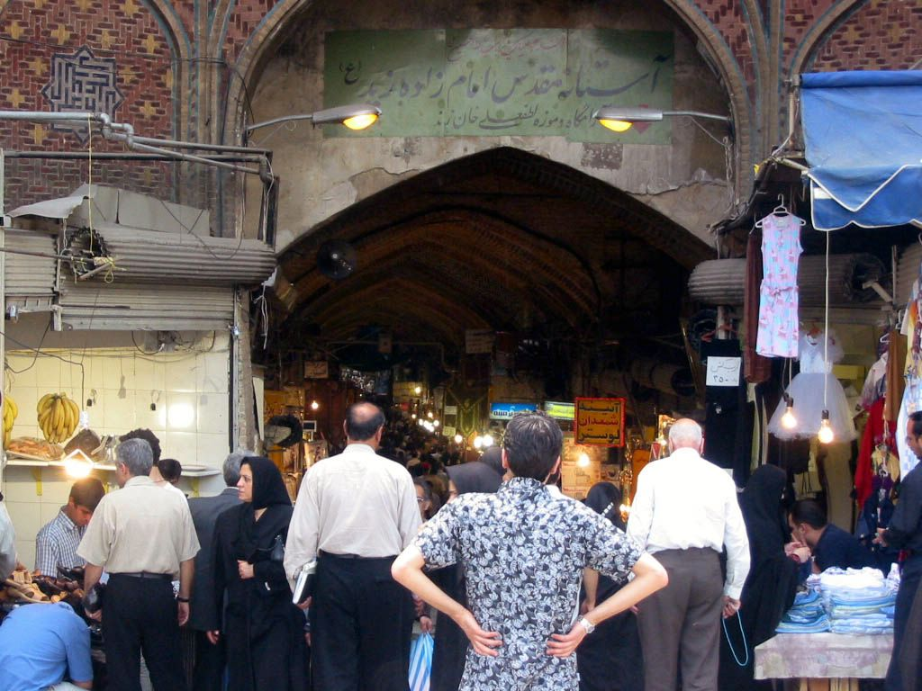 Grand Bazaar in Tehran, Iran